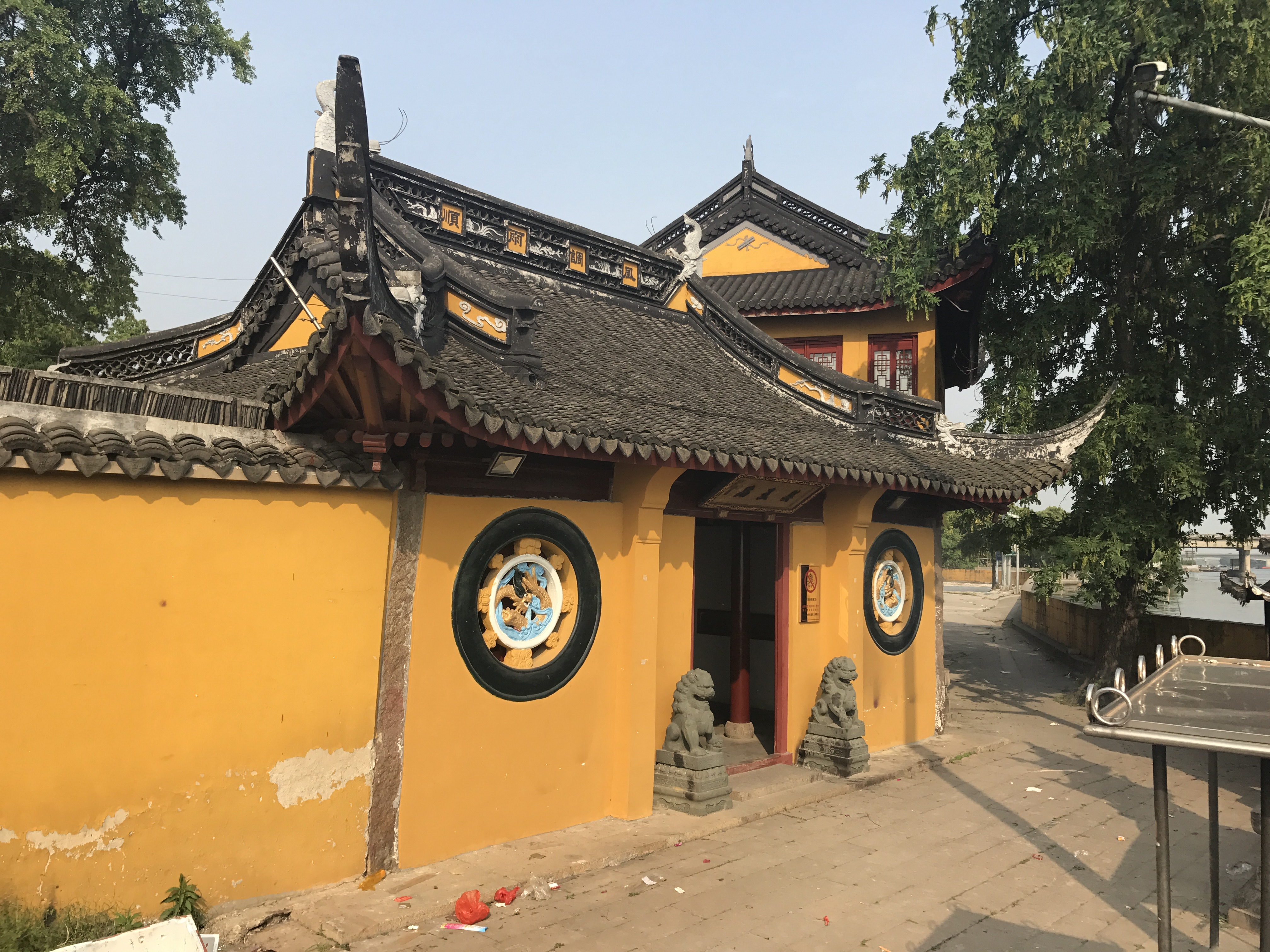 关王庙 青浦区朱家角镇淀峰村